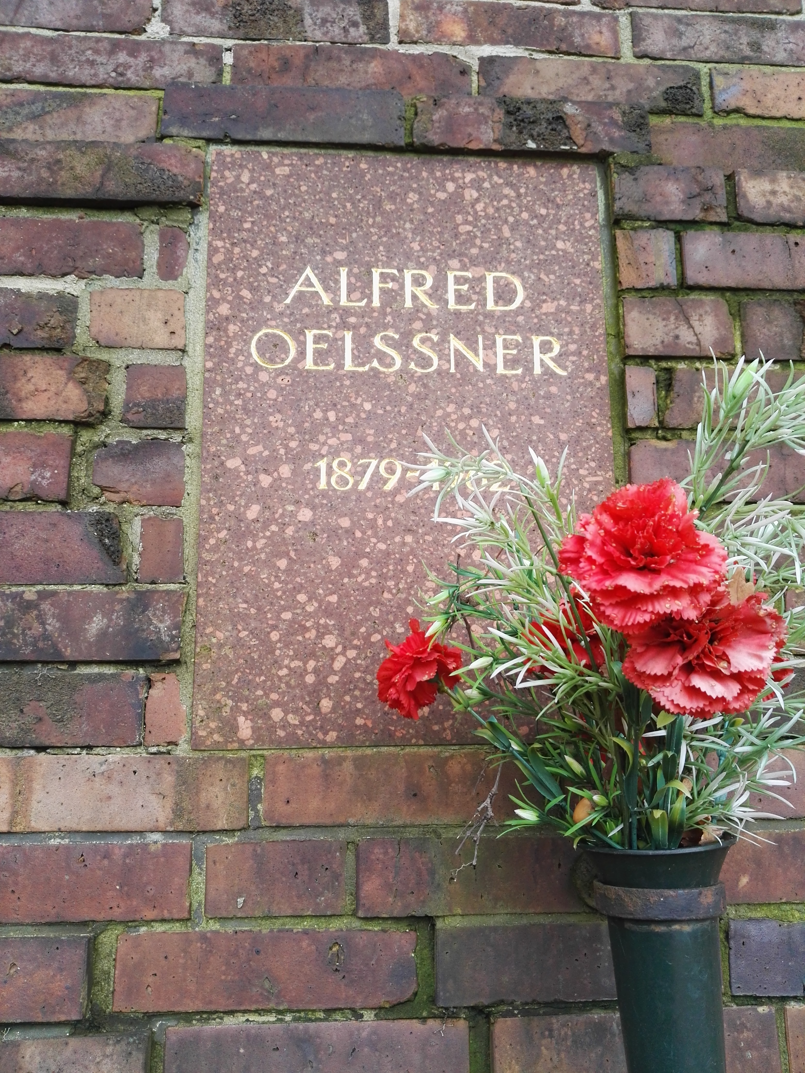 Grab von Alfred Oelßner (1879-1962) in der Gedenkstätte der Sozialisten auf dem Zentralfriedhof Friedrichsfelde in Berlin-Lichtenberg